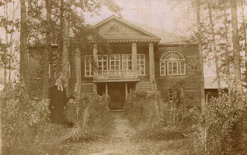 Усадьба Кузнецово Ю.М. Зубова, место роддения П. Ю. Зубова (1871—1942), земского начальника, товарища головы города Вологды (1918), член Временного правительства Северной области (1918—1920)